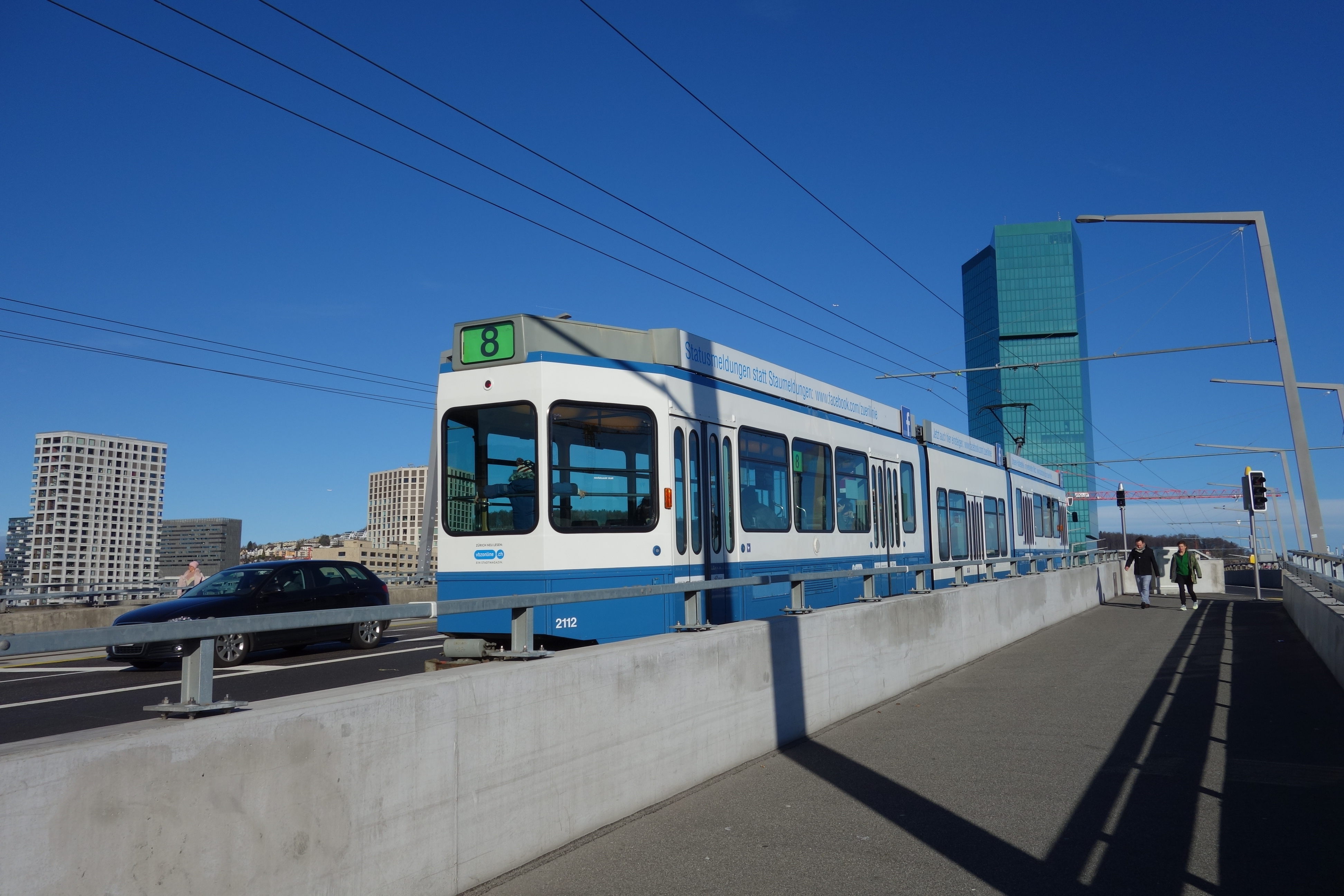 Tram 8, Hardbrücke, Zürich, Schweiz